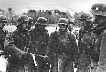 Soldati della 369. Divisione croato-tedesca.